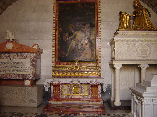 Pantheon of the Infantes - Chapel 1. Otros miembros de la familia pueden ser encontrados sepultaron en otros espacios de cripta del Escorial